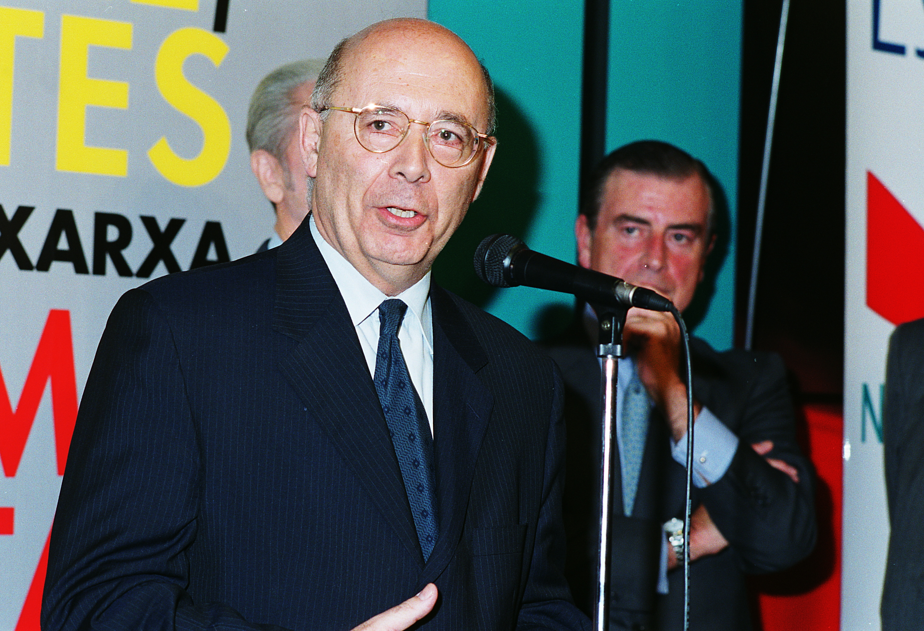 El Molt Honorable Joan Rigol al MHC el 2001.